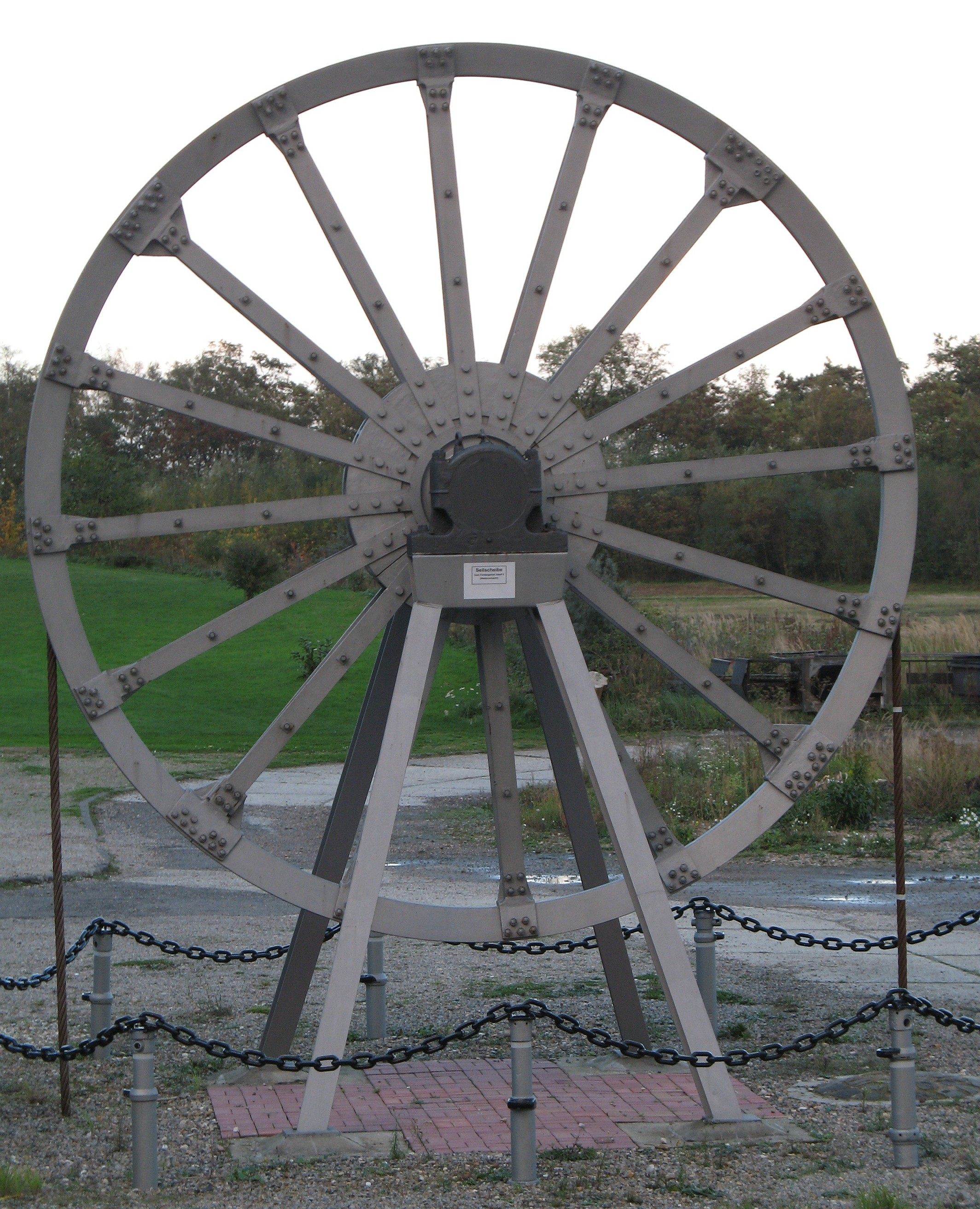 Seilrolle im Grube-Adolf-Park bei Herzogenrath-Merkstein